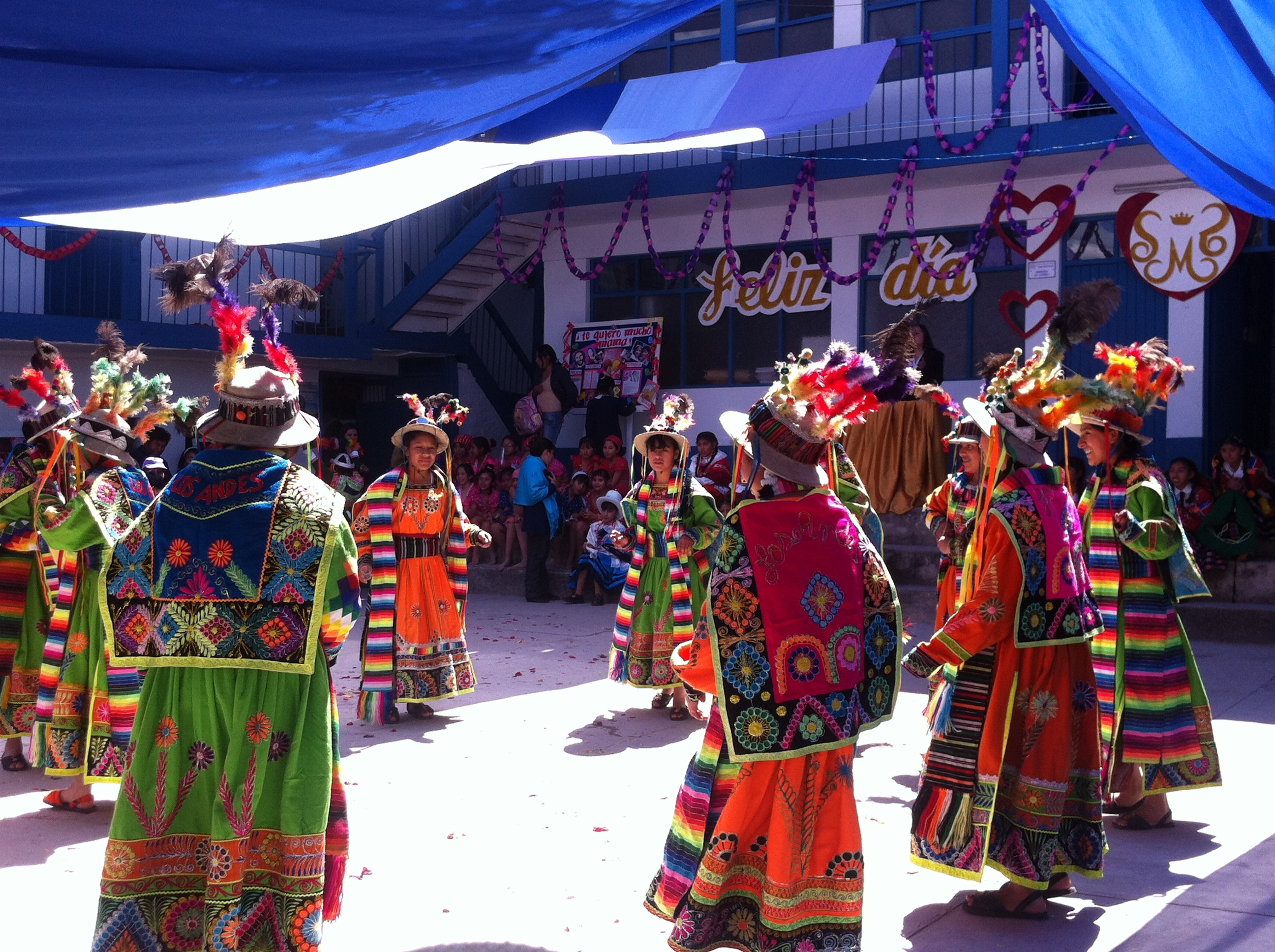 Peru - Cusco 106 - school traditional dance festival